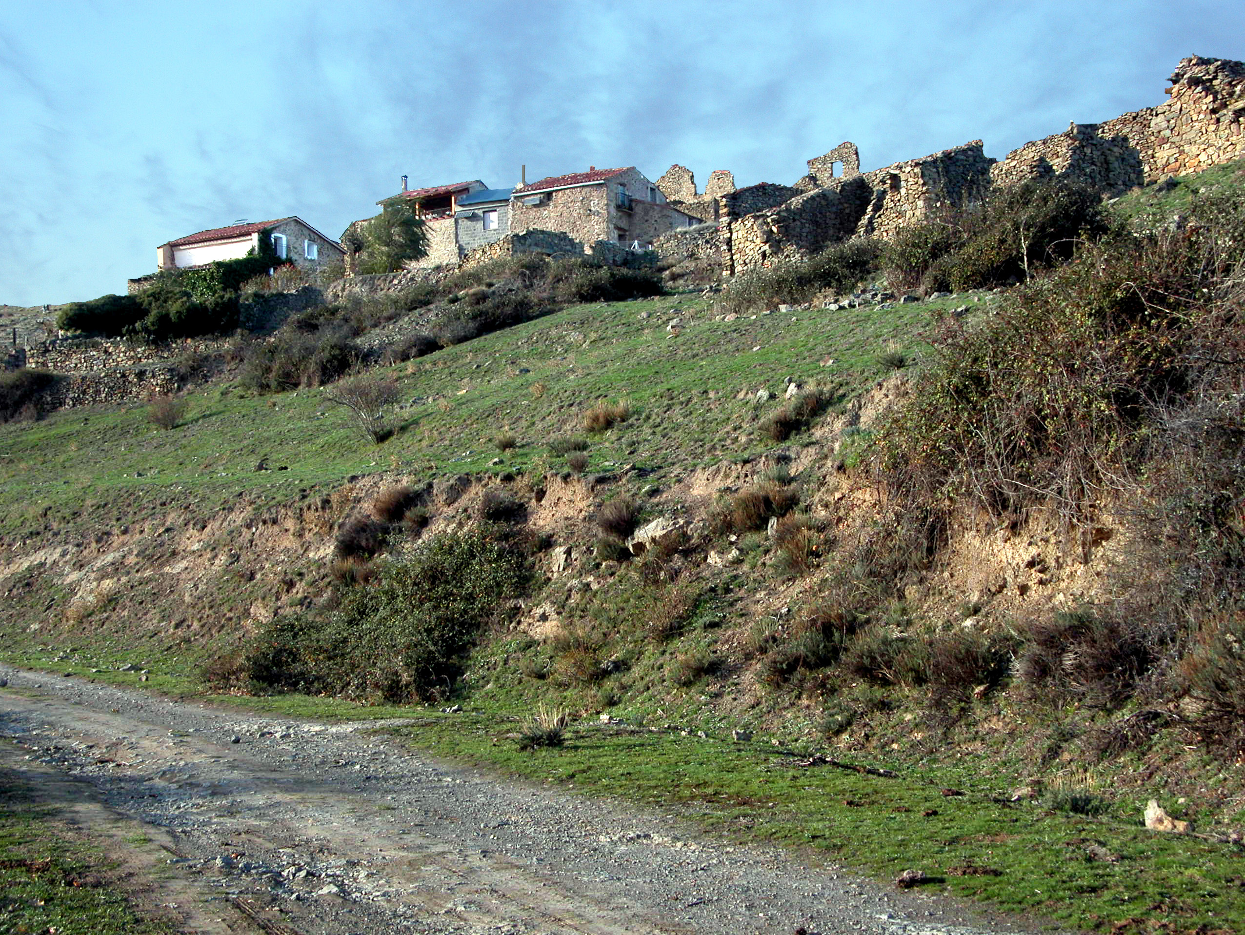 LARRIBA (Aldea de AJAMIL DE CAMEROS). Vista desde la carretera hacia Zarzosa.